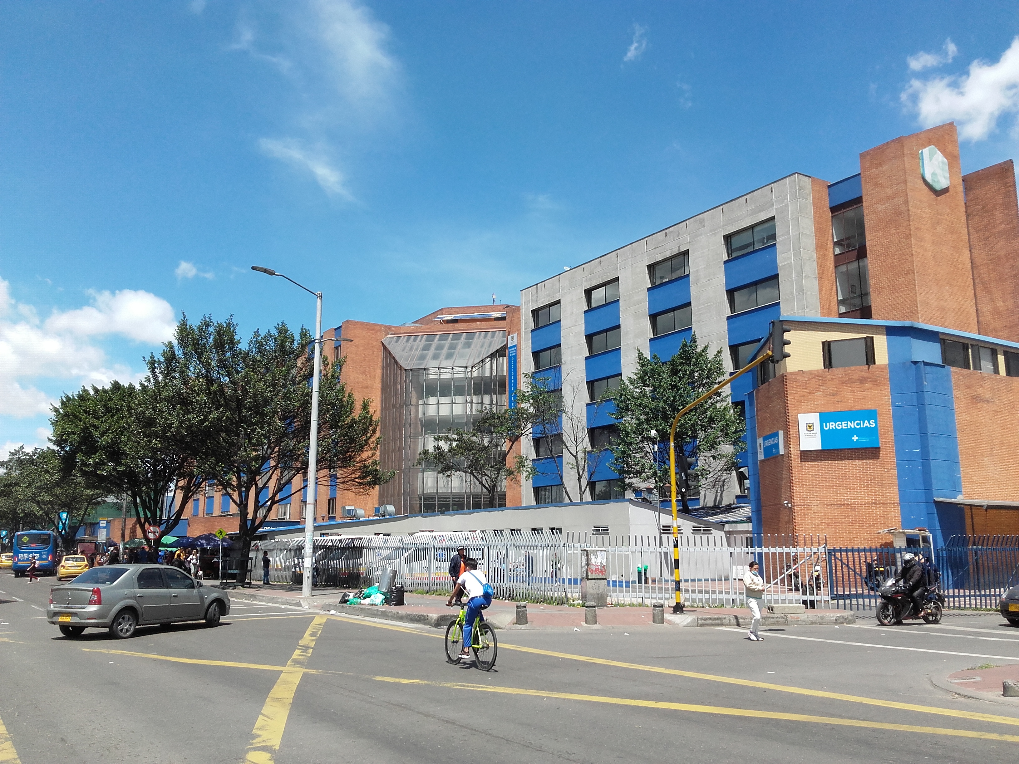 ndndndndnxnmfkgng